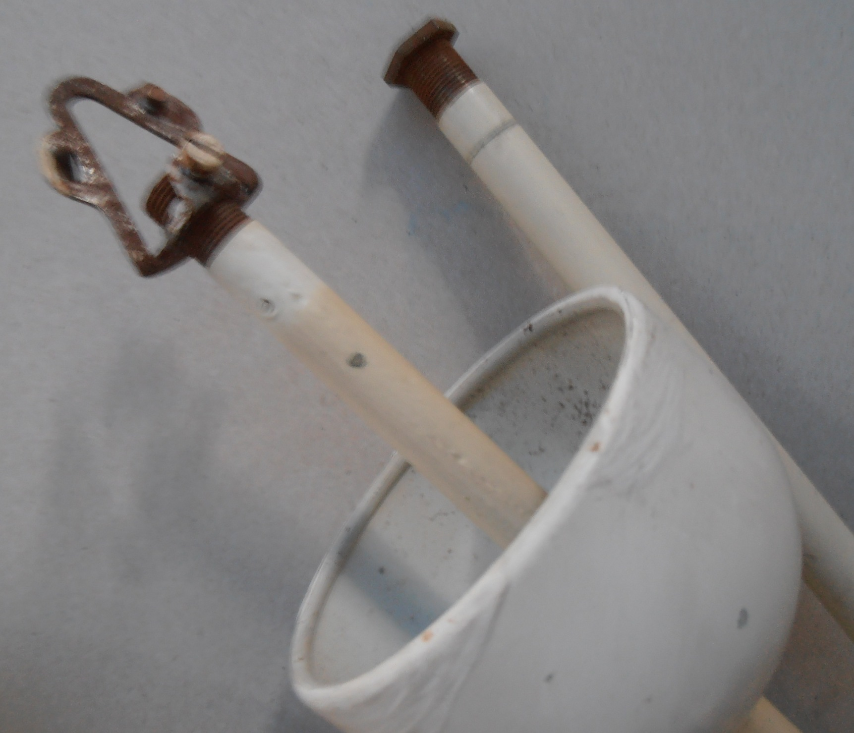 Zwei Pendenstangen, links mit Schubrosette und Aufhängung